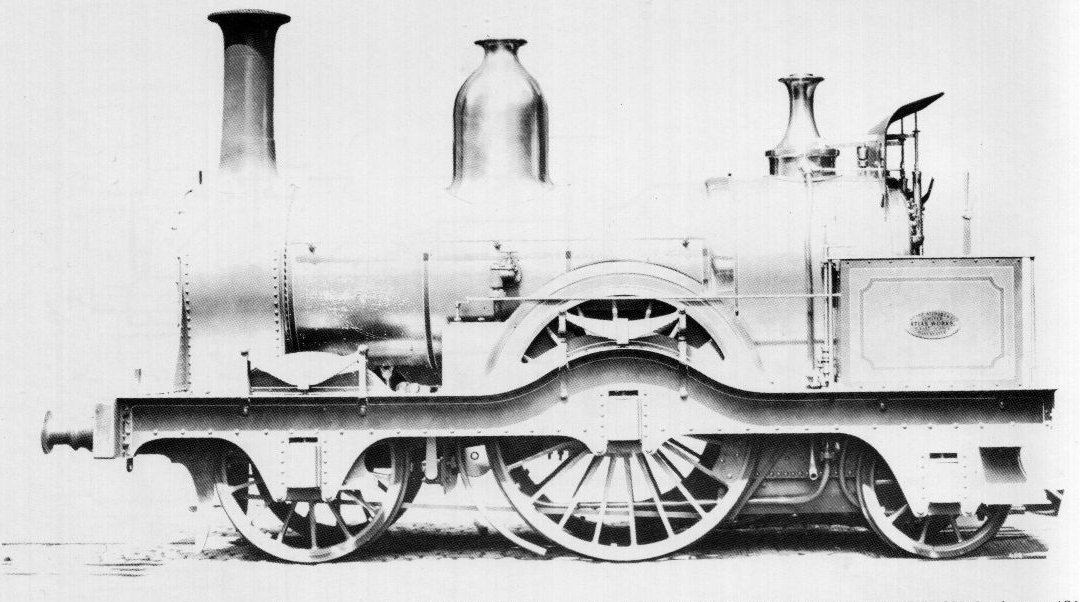 Werkfoto Sharp, da de.wiki